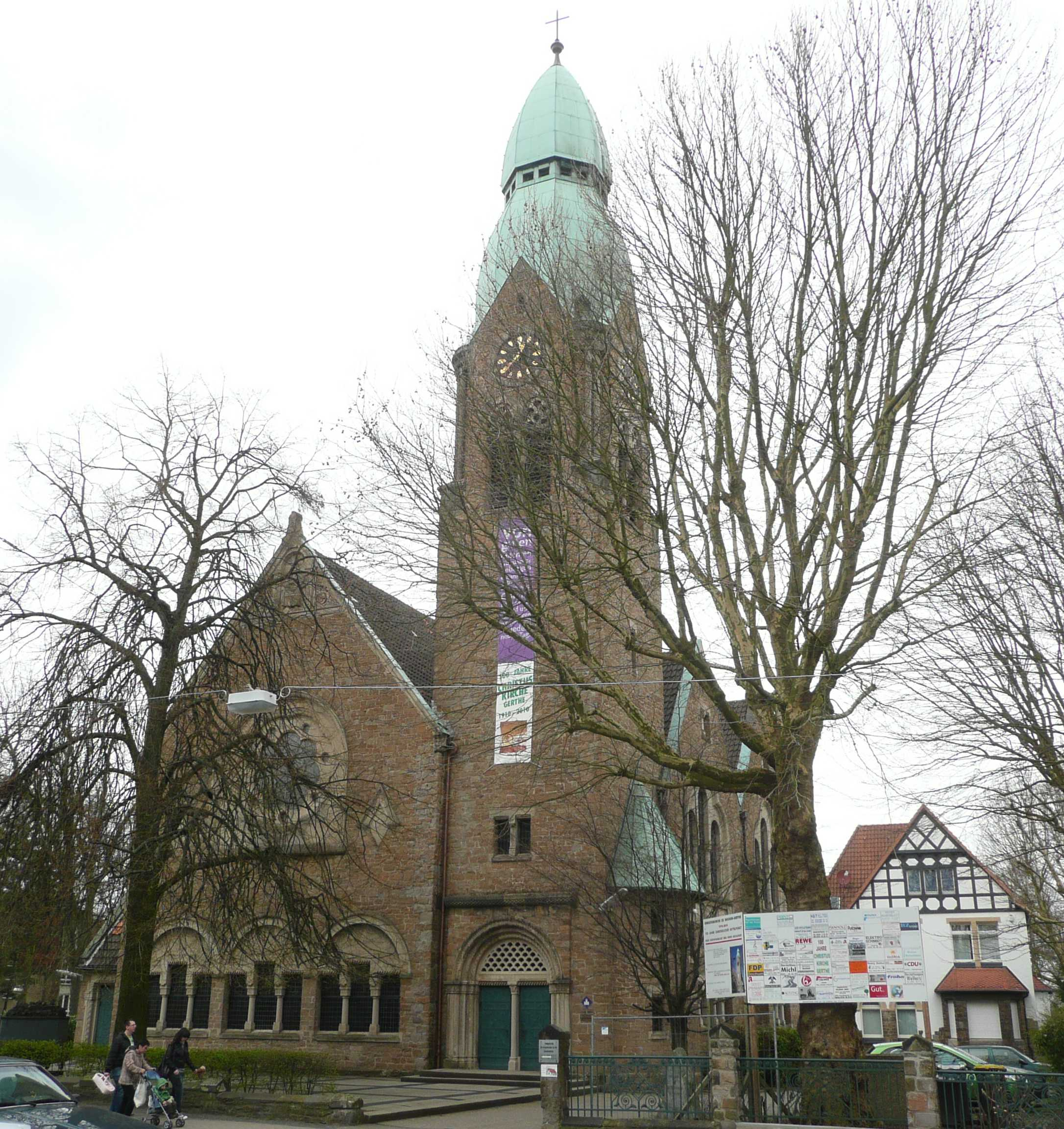 Evangelische Christuskirche, Bochum Gerthe, Lothringer Straße